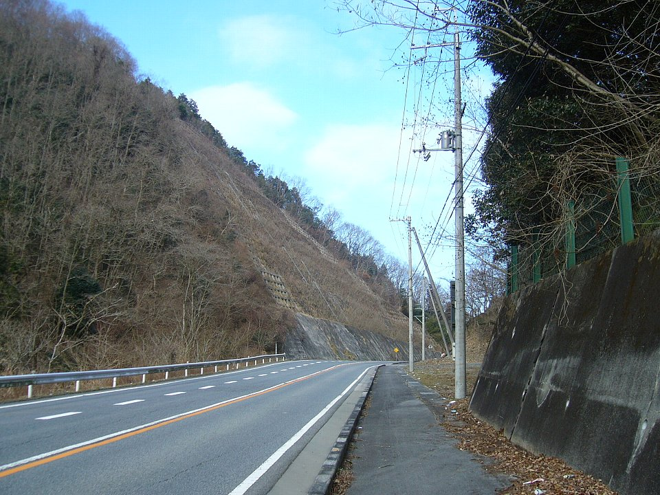 相坂峠（国道179号）